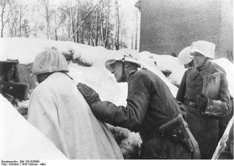 Scherl Der General bei den Männern in den vordersten Linien Der Oberbefehlshaber einer Armee, General der Kavallerie Lindemann, beim Besuch seiner Infanteristen im vordersten Graben vor Leningrad. PK-Aufnahme: Kriegsberichter Schröter 16.3.42 [Herausgabedatum]